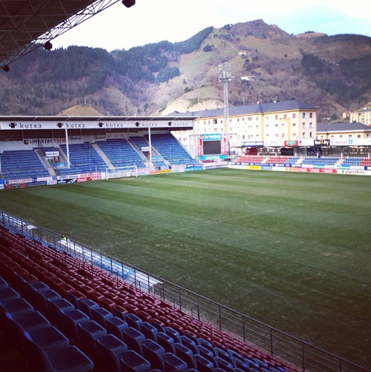 Ipurua estadioaren barnealdeko ikuspegia.